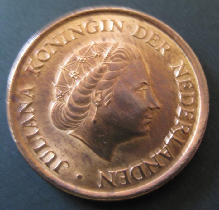 Nederlandse stuiver uit 1980, muntmeester Ir.B.C.H.J.Smit, muntmeesterteken Haan met ster, Juliana 5 cent, kopzijde.